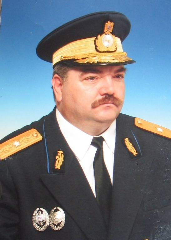 Emil Strainu